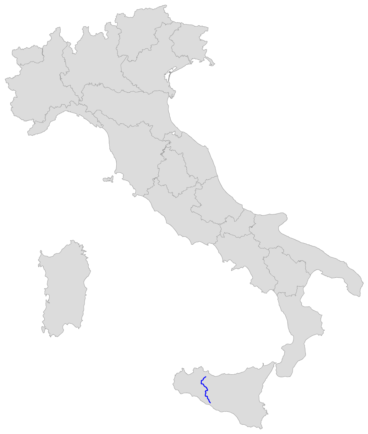 Percorso della SS 118 Corleonese Agrigentina